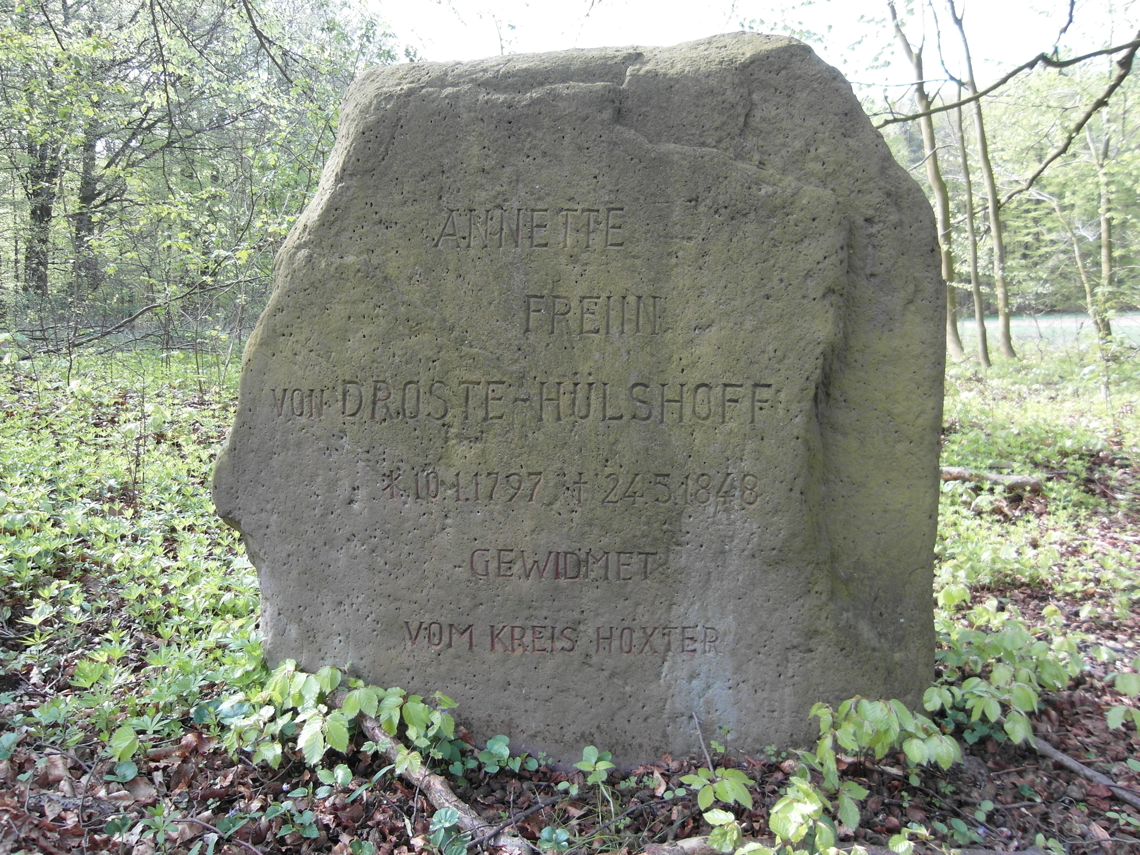 Dieses Foto zeigt den Droste-Stein im Königslau, einem Waldstück in der Nähe von Bökendorf. Er erinnert an die westfälische Dichterin Annette von Droste-Hülshoff.